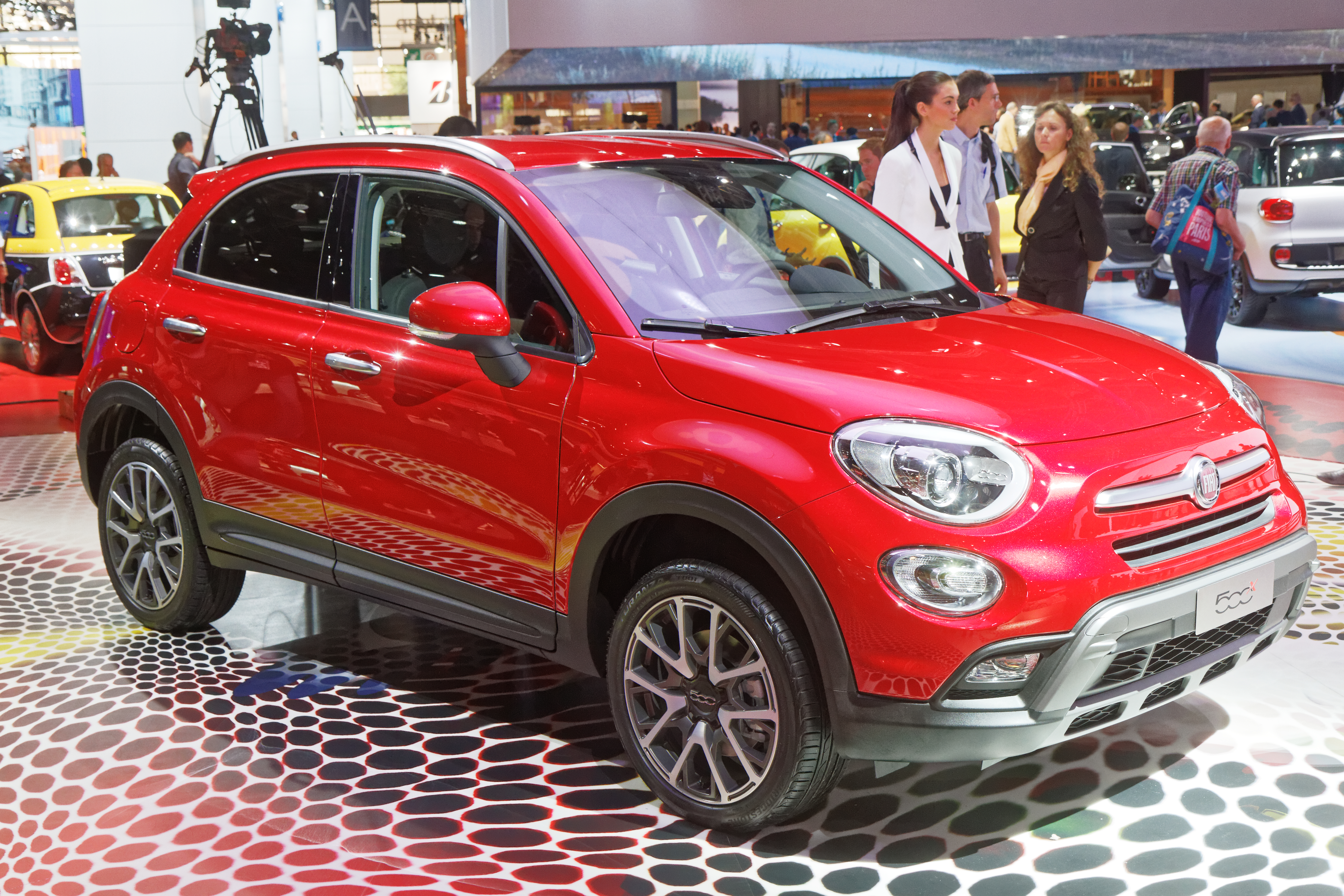 Une Fiat 500 présentée lors du mondial de l'automobile de Paris 2014.